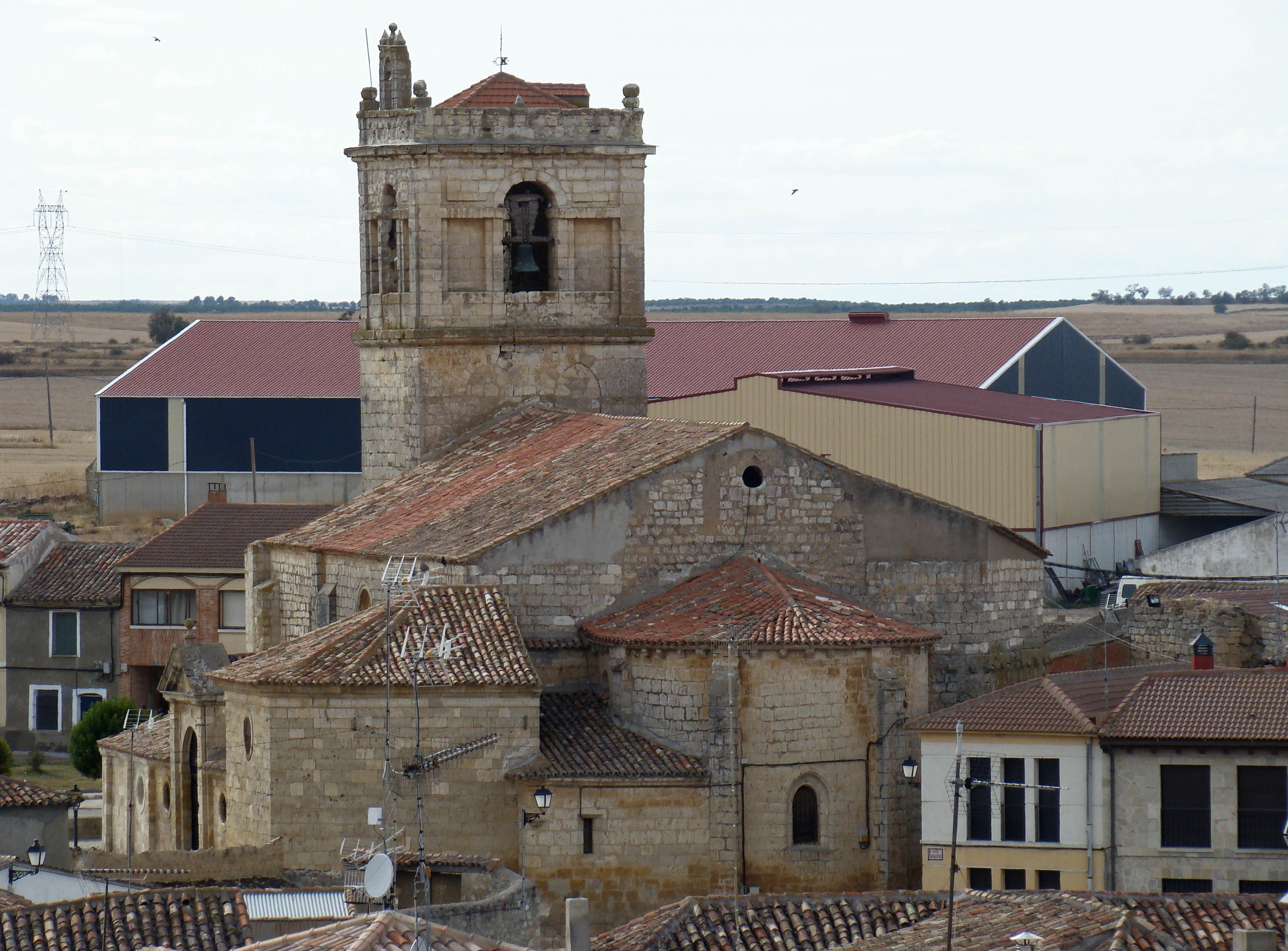 Iglesia de Santiago Apóstol en Villalba de los Alcores, provincia de Valladolid, España.